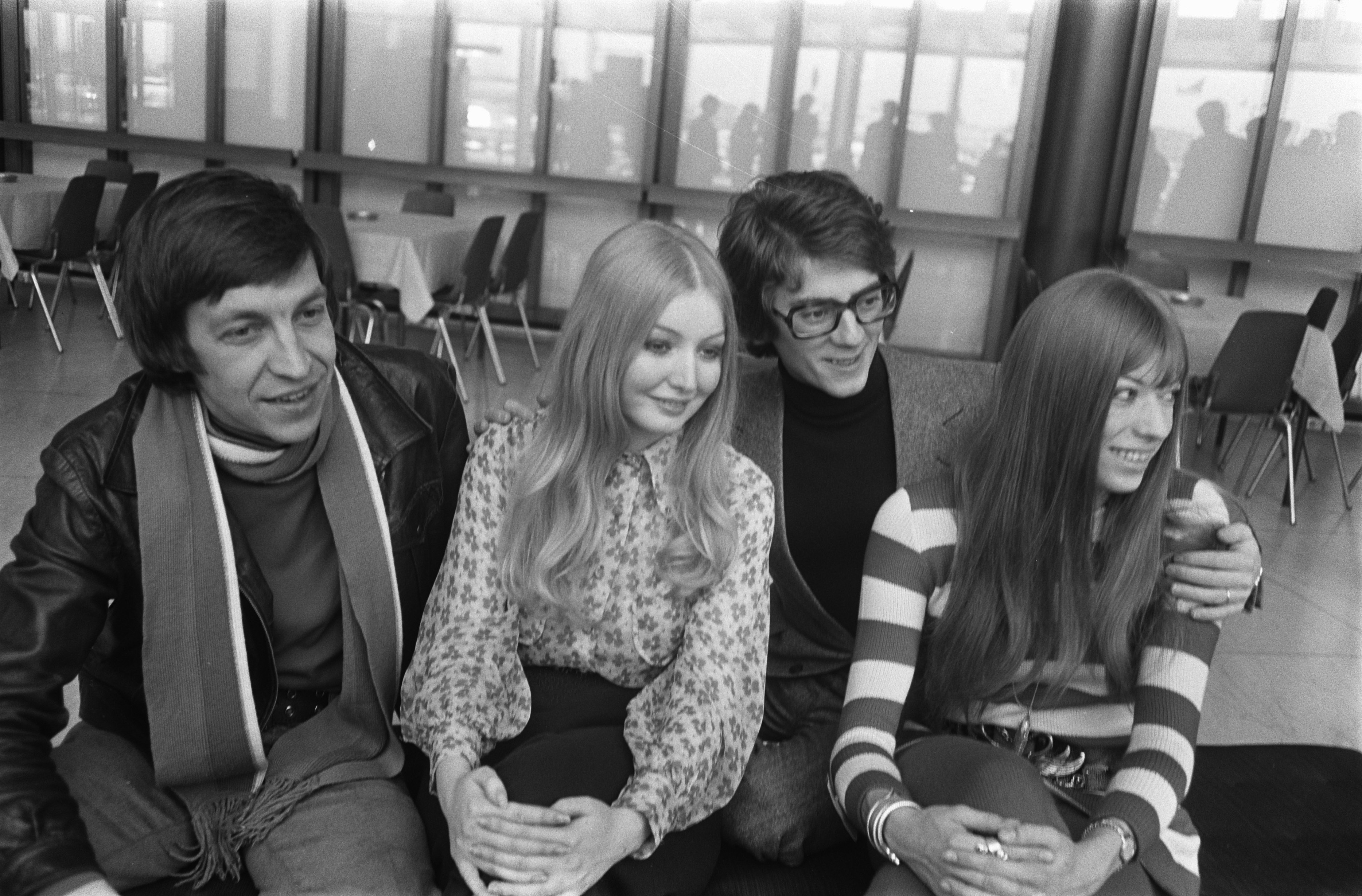 Collectie / Archief : Fotocollectie Anefo Reportage / Serie : Eurovisie Songfestival 1970 in RAI te Amsterdam Beschrijving : Aankomst artiesten op Schiphol. Vlnr: , Henry Des (Zwitserland), Mary Hopkin (Engeland), Guy Bonnet (Frankrijk) en Katja Ebstein (Duitsland) Datum : 19 maart 1970 Locatie : Schiphol Trefwoorden : artiesten, songfestivals, zangers Persoonsnaam : Bonnet, Guy, Des, Henry, Ebstein, Katja, Hopkin, Mary Instellingsnaam : Eurovisie Song Festival Fotograaf : Koch, Eric / Anefo Auteursrechthebbende : Nationaal Archief Materiaalsoort : Negatief (zwart/wit) Nummer archiefinventaris : bekijk toegang 2.24.01.05 Bestanddeelnummer : 923-3639 Reacties Geplaatst door Musiclady op 28 juli 2016 - 09:35. v.l.n.r. (Zwitserland) Henri Des, (Engeland) Mary Hopkin, (Frankrijk) Guy Bonnet, (Duitsland) Katja Ebstein